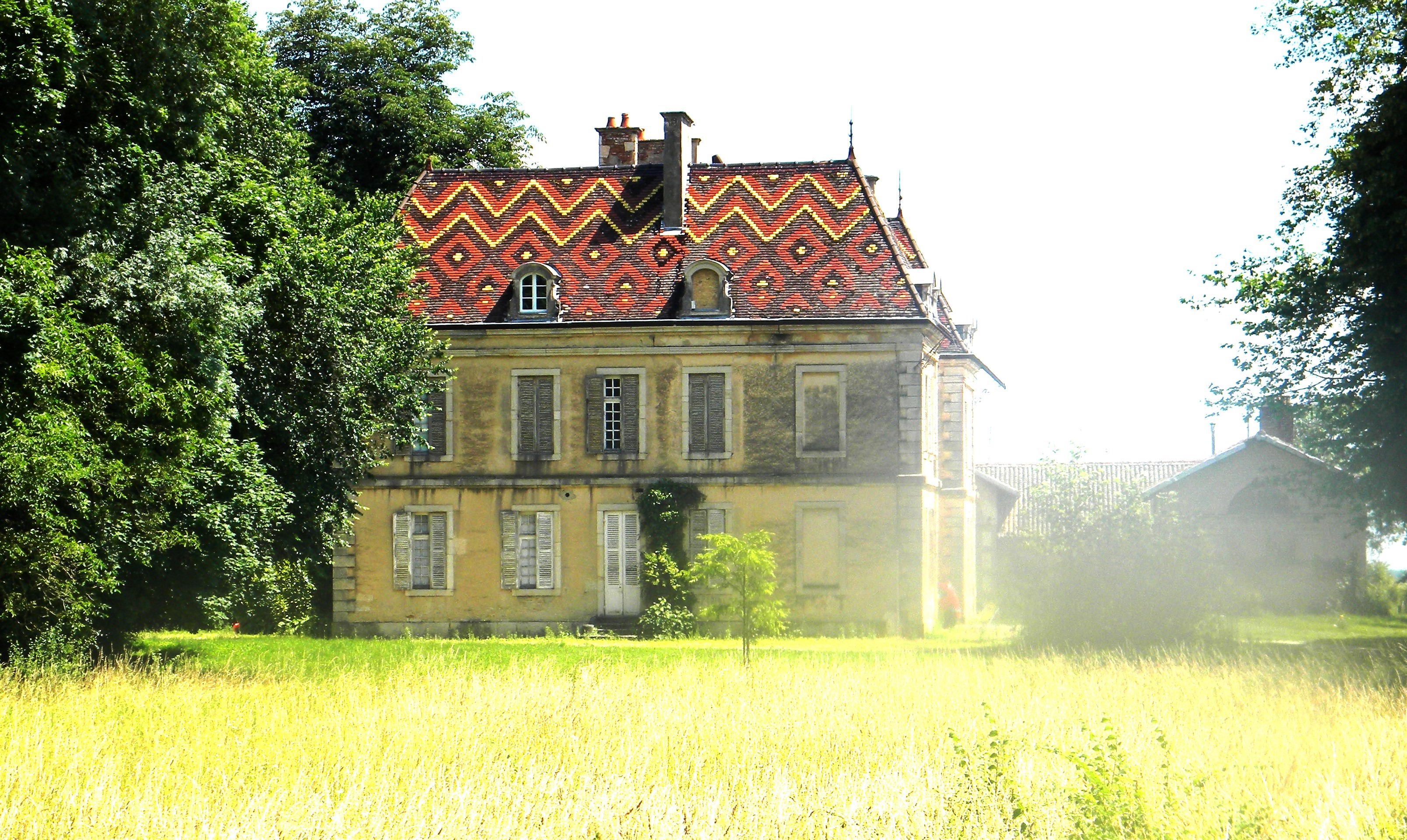 Kastelo